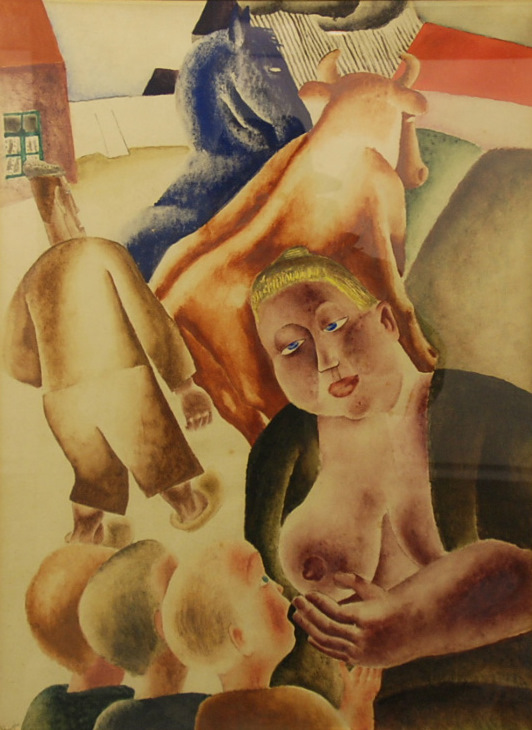 Frits Van den Berghe (1883-1939) - Vruchtbaarheid - in het Kunstmuseum aan Zee te Oostende, België